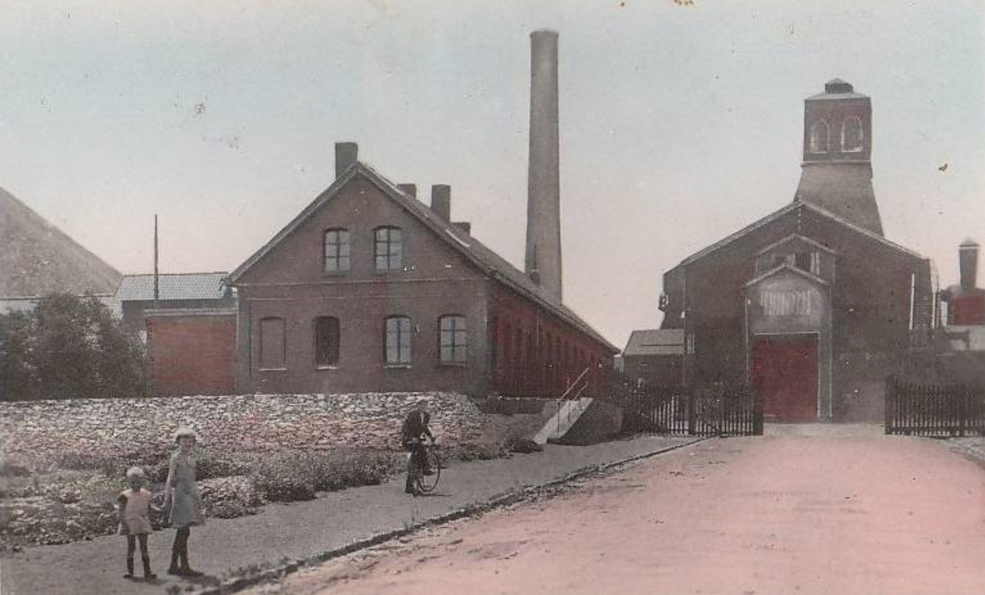 La Fosse n° 7 - 7 bis de la Compagnie des mines de Nœux était un charbonnage constitué de deux puits situé à Barlin, Pas-de-Calais, Nord-Pas-de-Calais, France.